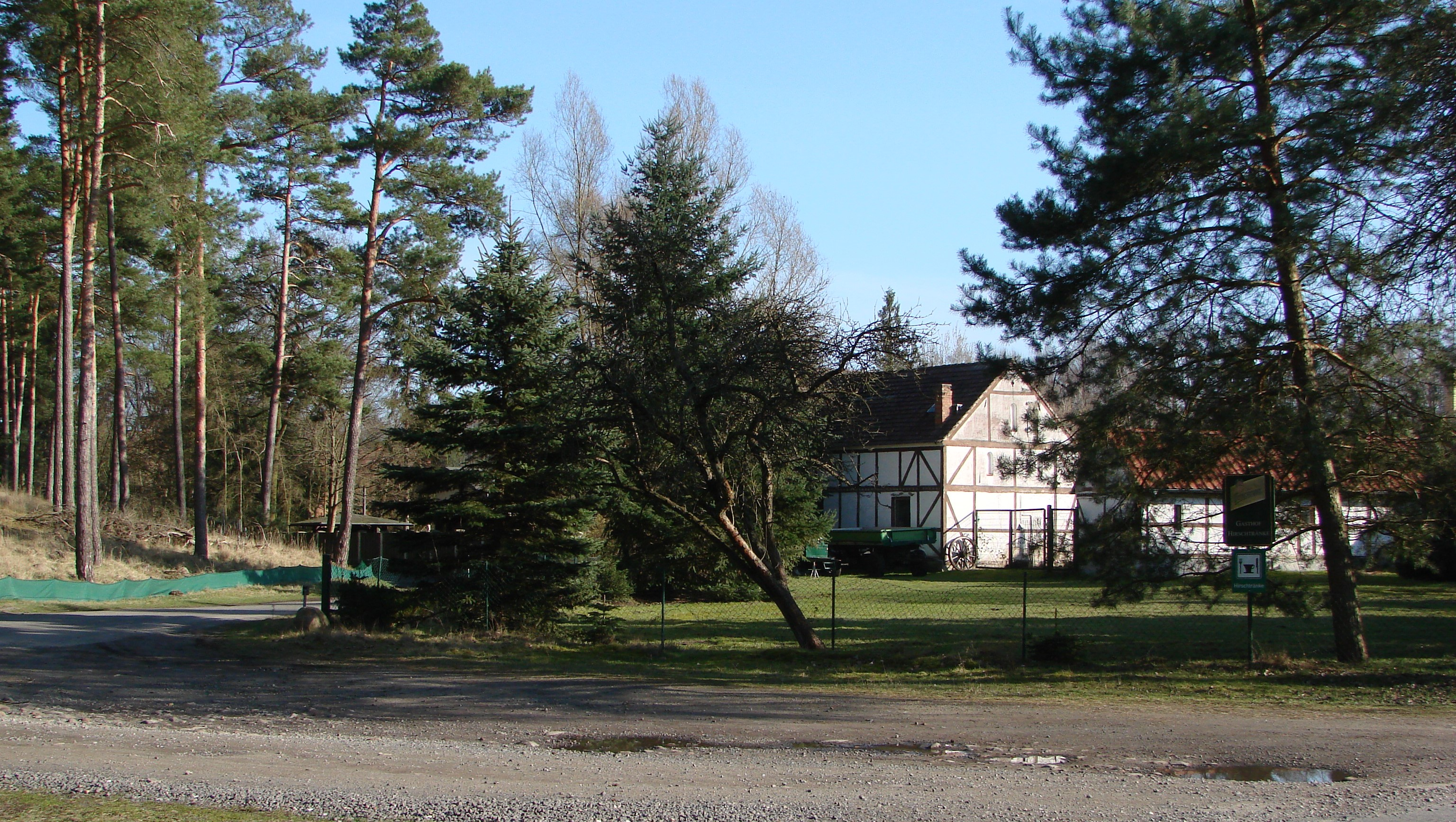 Verlorenwasser ist ein Gemeindeteil von Bad Belzig.